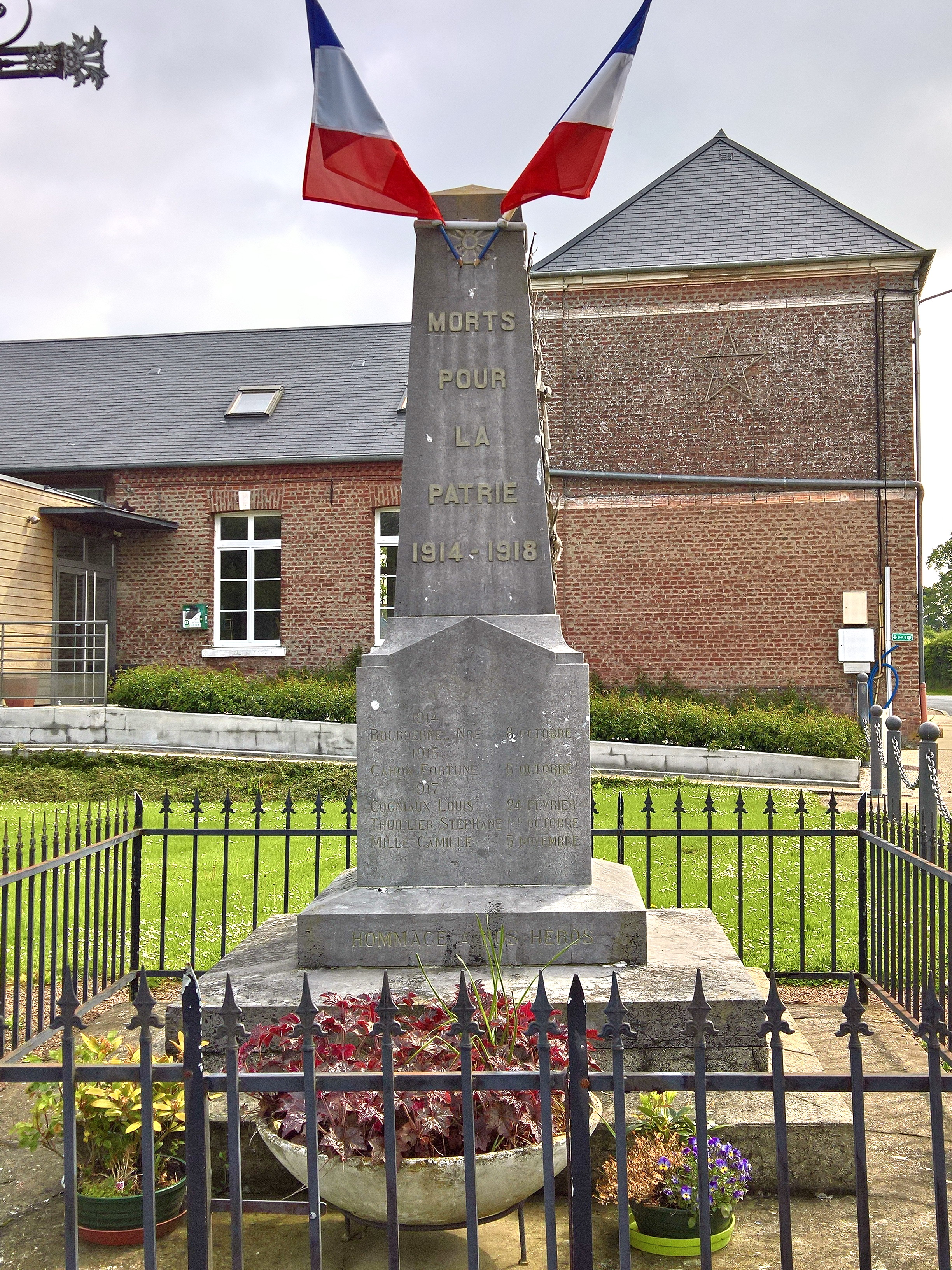 Camps-en-Amienois : Monuments aux morts